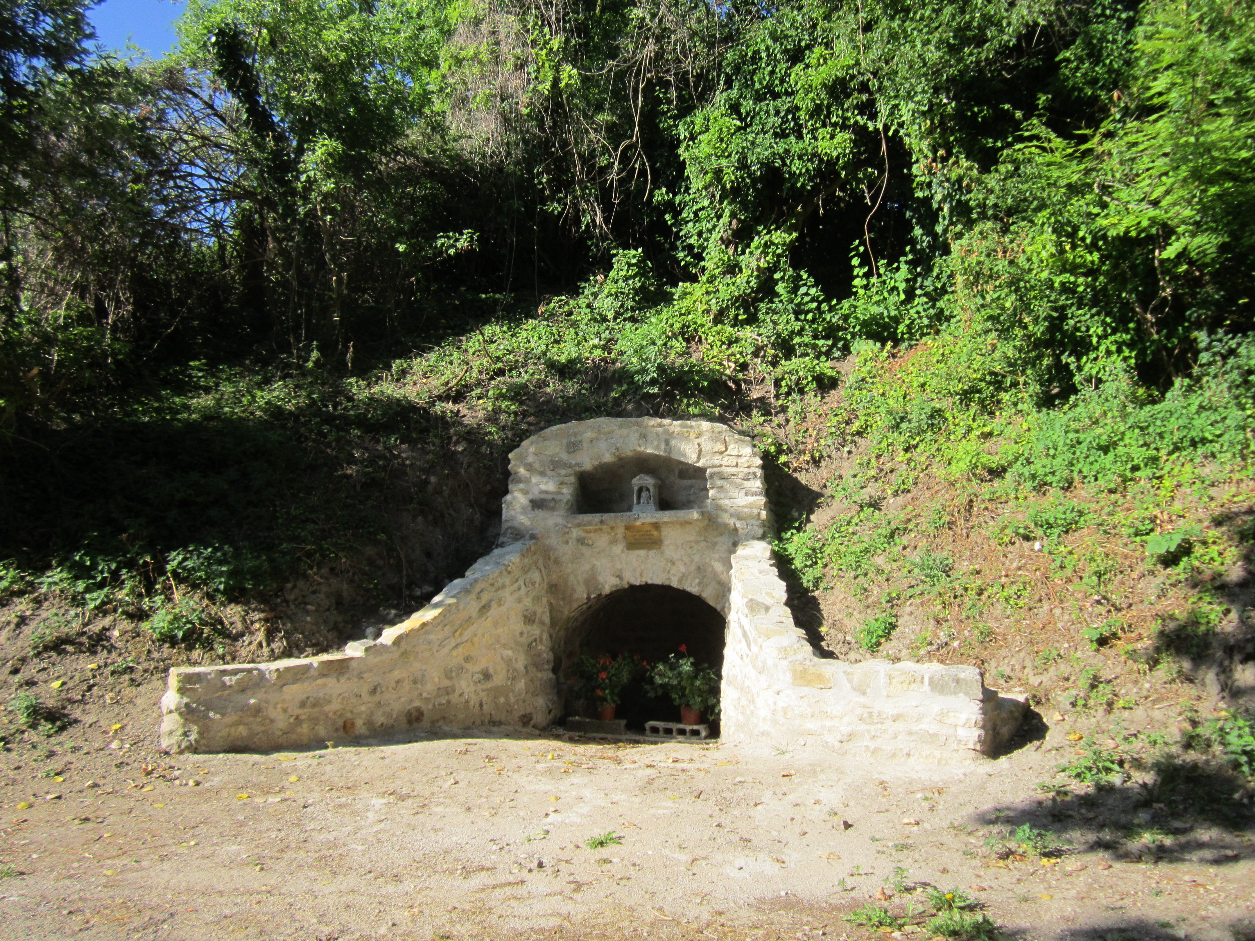 Fontaine construite au XIXe siècle et mise sous la protection de saint Aignan. Cette prise d'eau servait à alimenter le lavoir communal, aujourd'hui détruit. La fontaine a été restaurée en 2015.